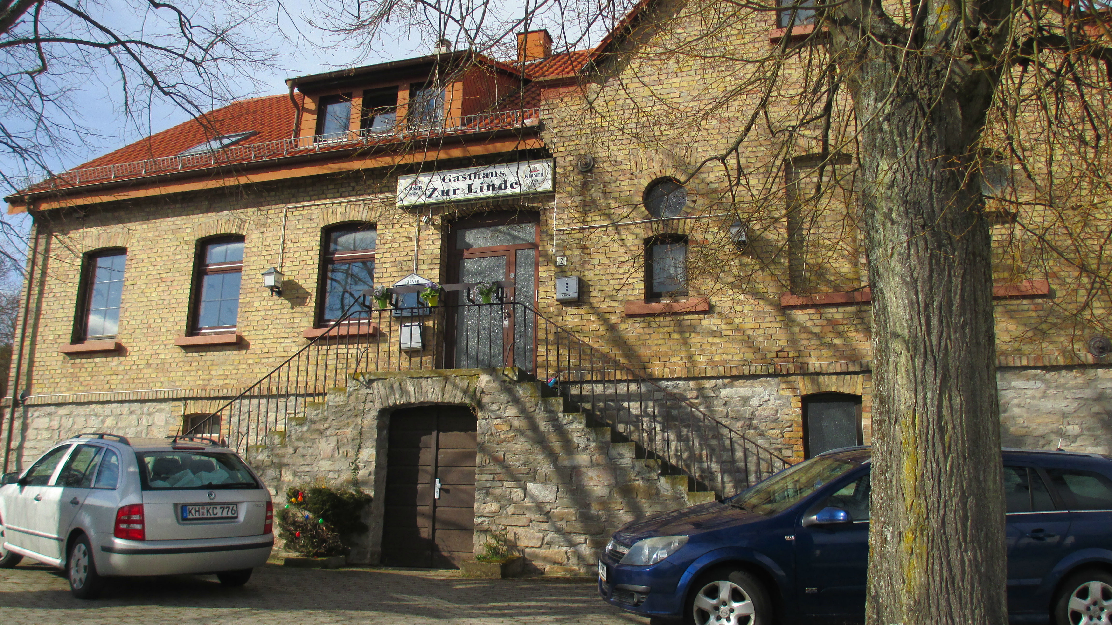 Alte Schule - Eckenroth, Schulweg 2